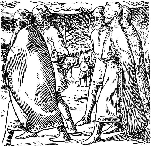 Halfdan Egedius: Illustration for Olav den helliges saga. Snorre 1899-edition. «De oplandske Konger gik til Samtale i Enrum.» nb: «De opplandske kongene gikk til samtale i enerom.» nn: «Opplandskongane gjekk til samtale seg imellom.»